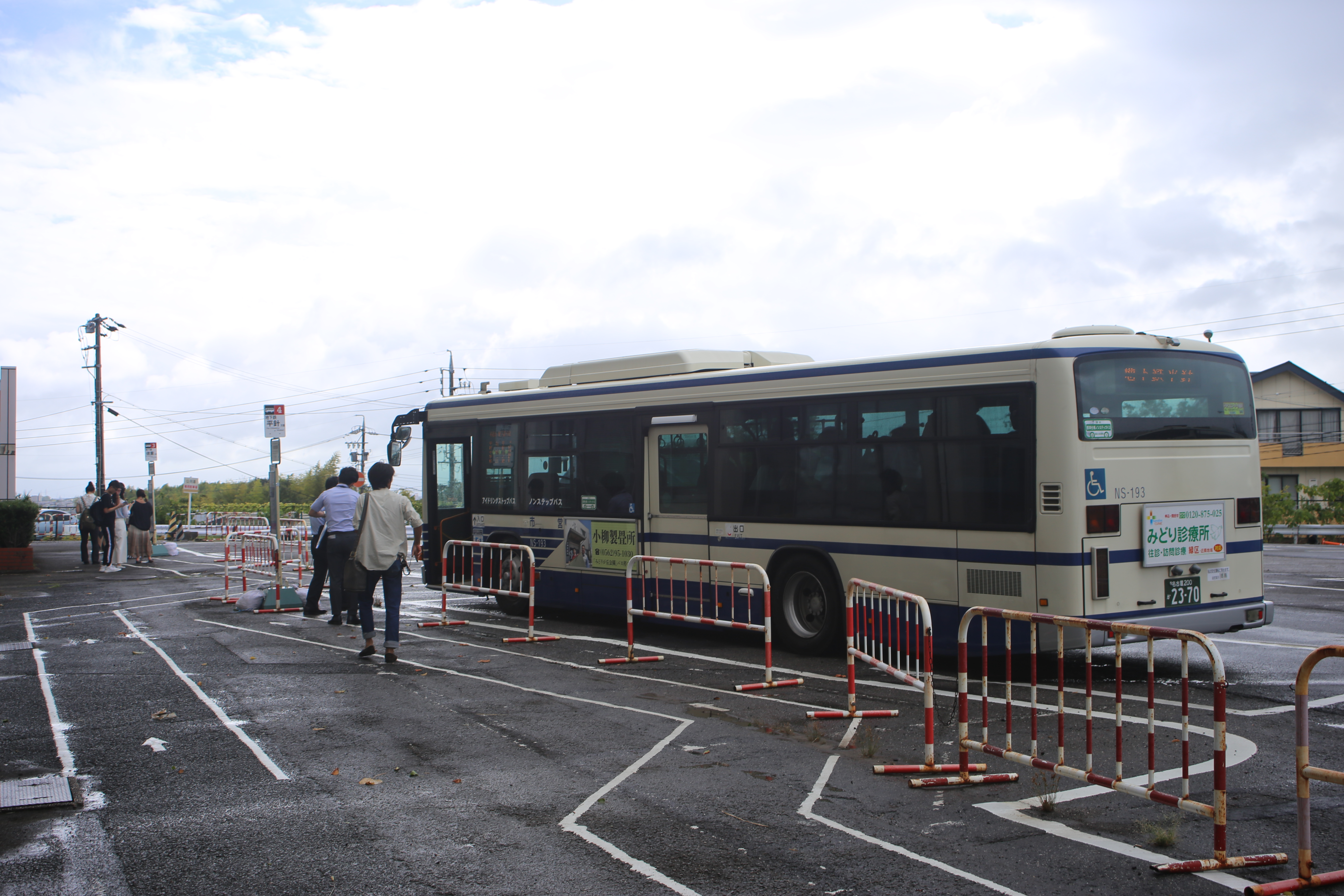 名古屋市天白区平針南の愛知県運転免許試験場内の名古屋市営バス停留所の様子